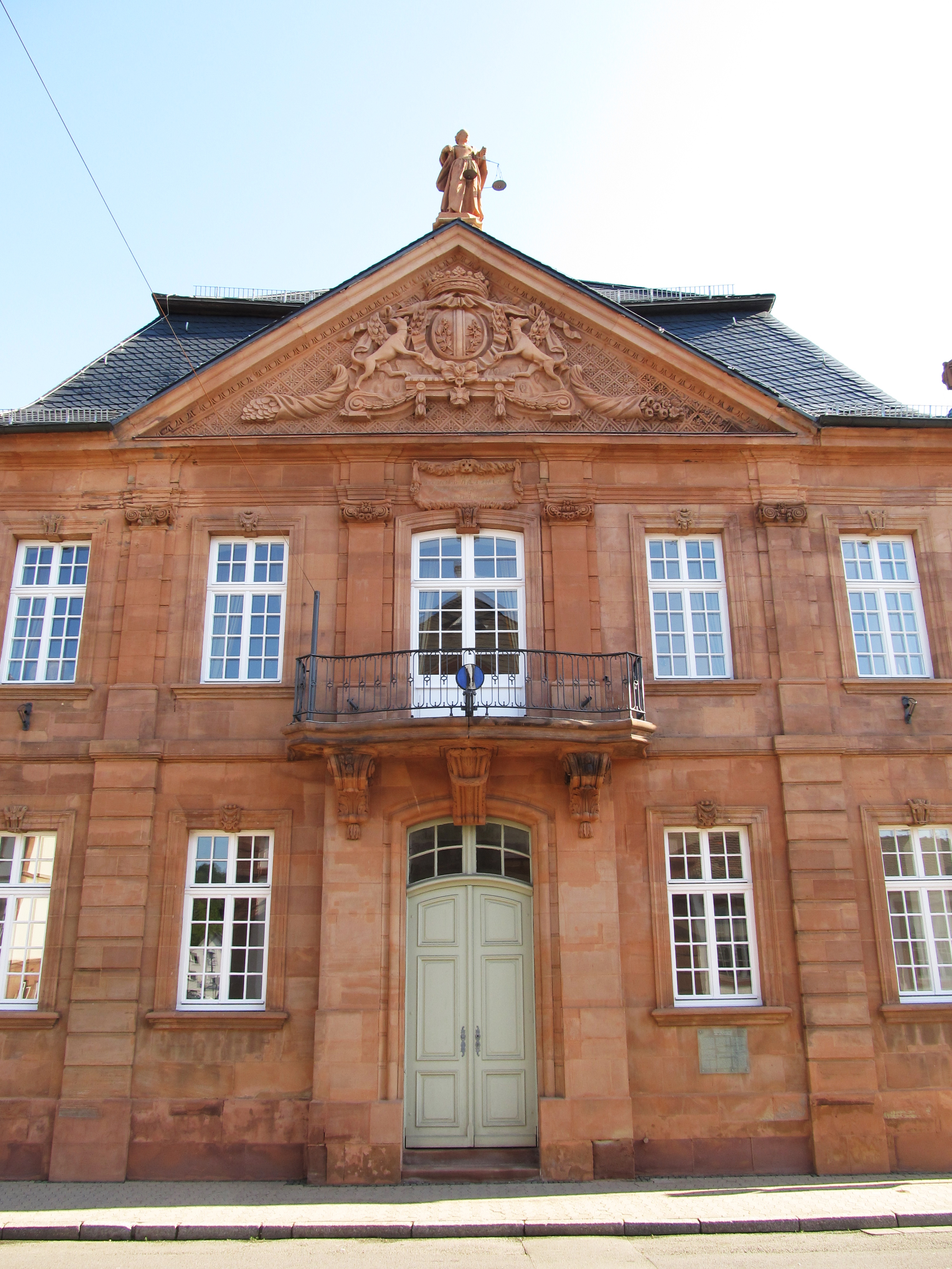 Blick auf die Südfassade des Blieskasteler Rathauses